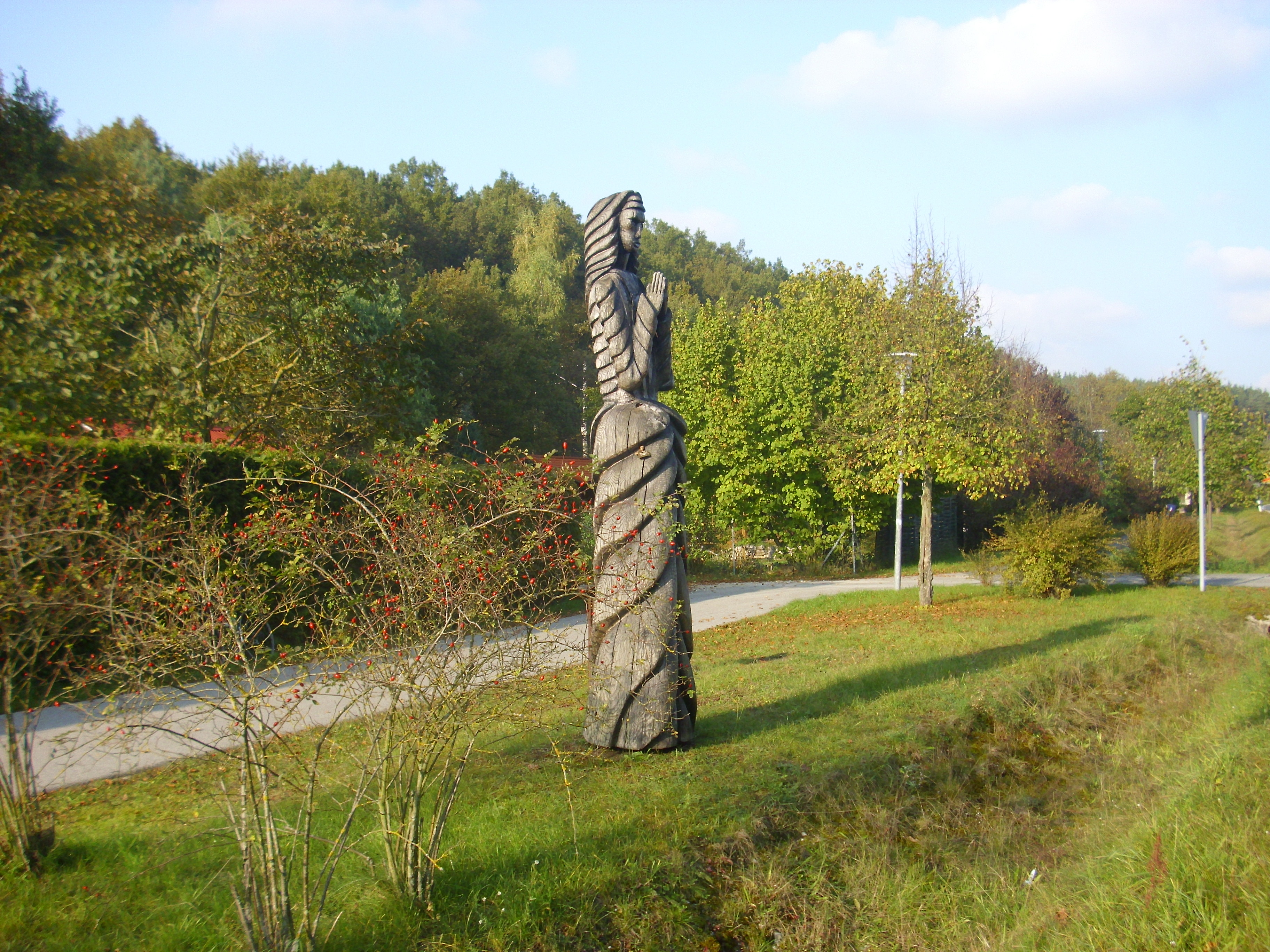 Die "Schwarze Madonna" von Ulrich Hallmeyer aus Abenberg als Teil des Skulpturenweges von Georgensgmünd